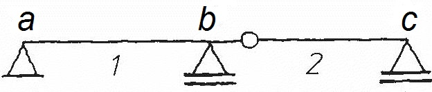 Gerberträger: Grundform mit 1 Drehgelenk